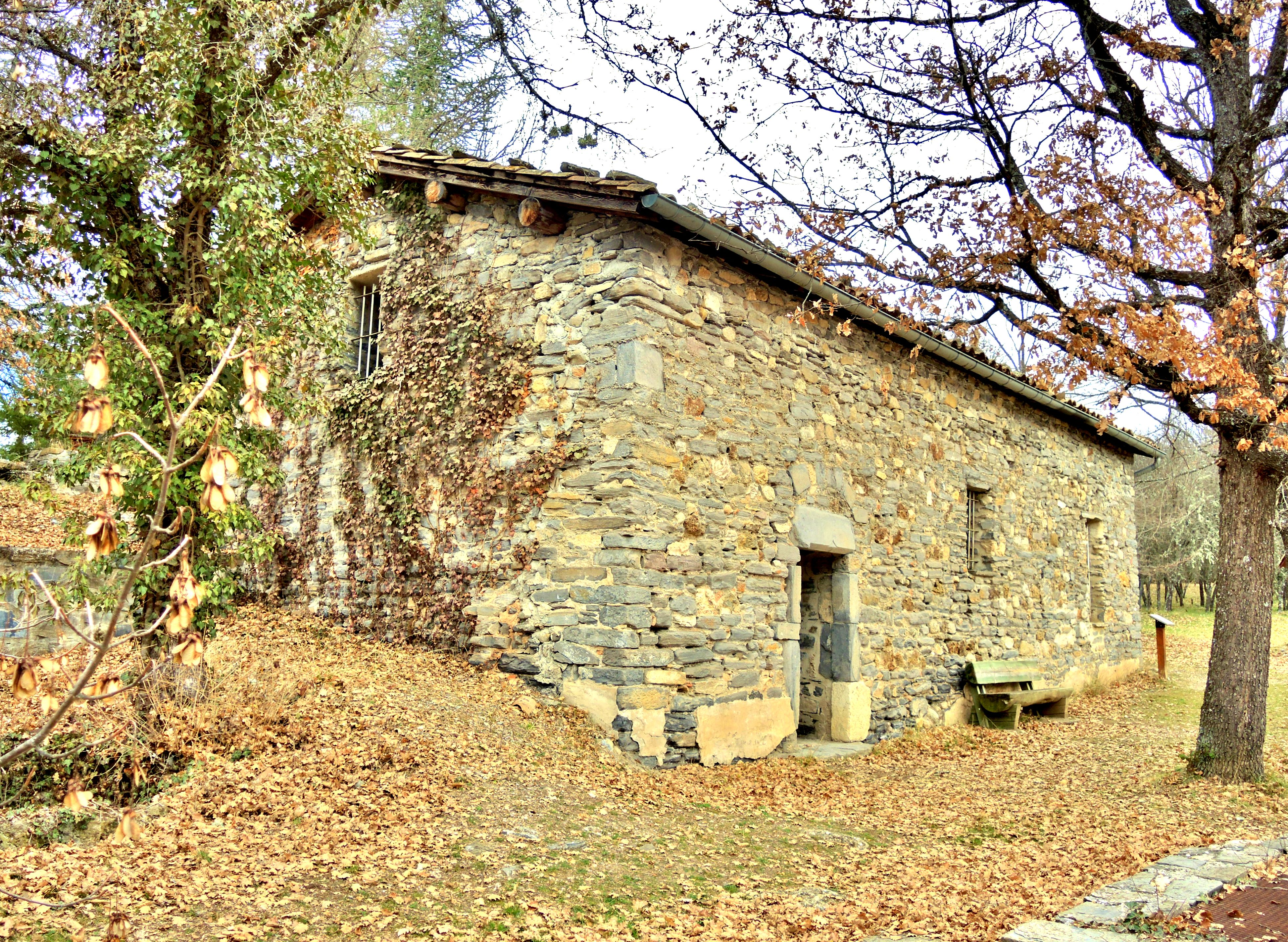 Ancienne église sainte Madeleine, sur le site de Vieil Eyguians.